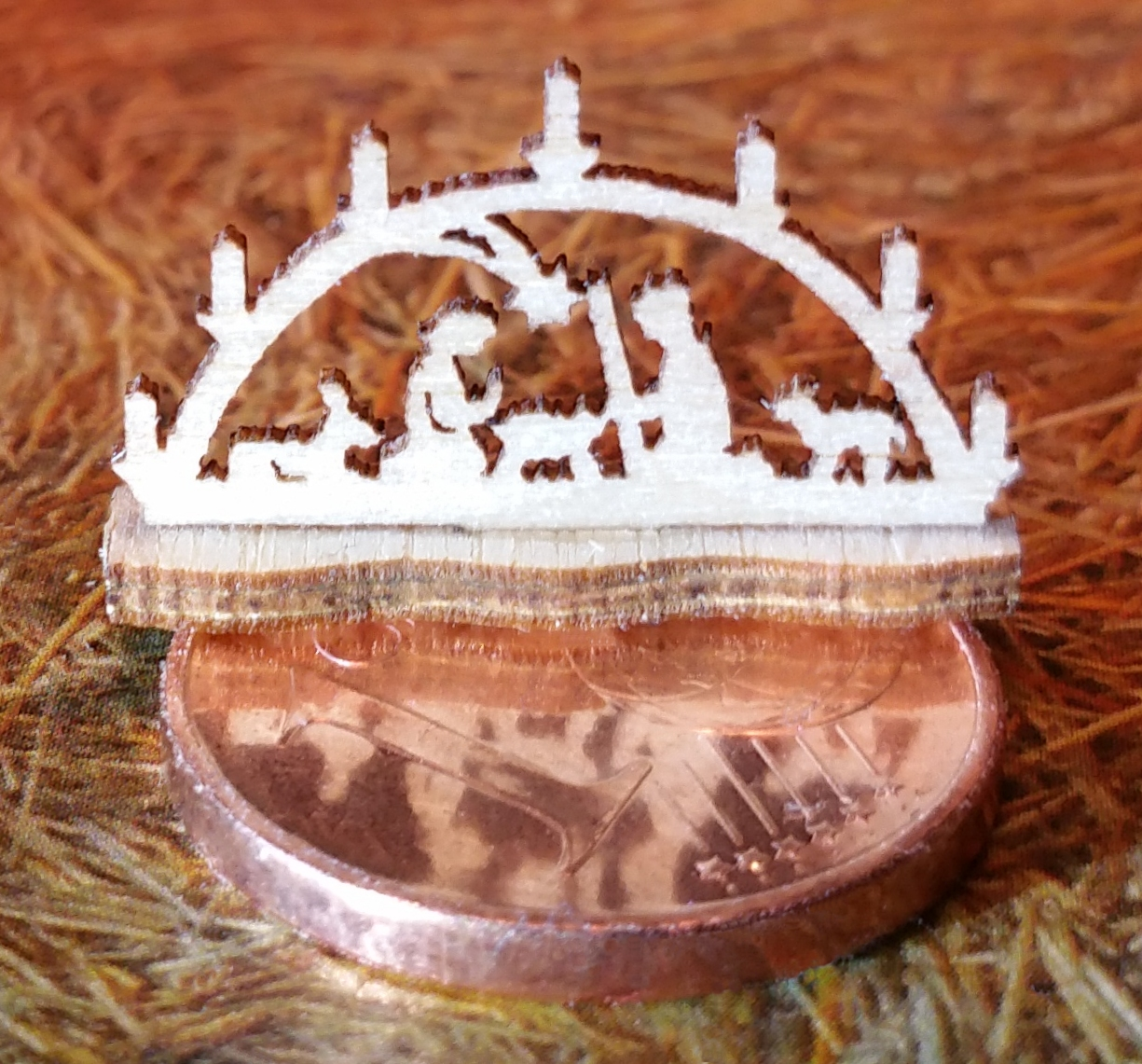 Kleinst-Schwibbogen auf einer 1-Cent-Münze, Länge: 18mm